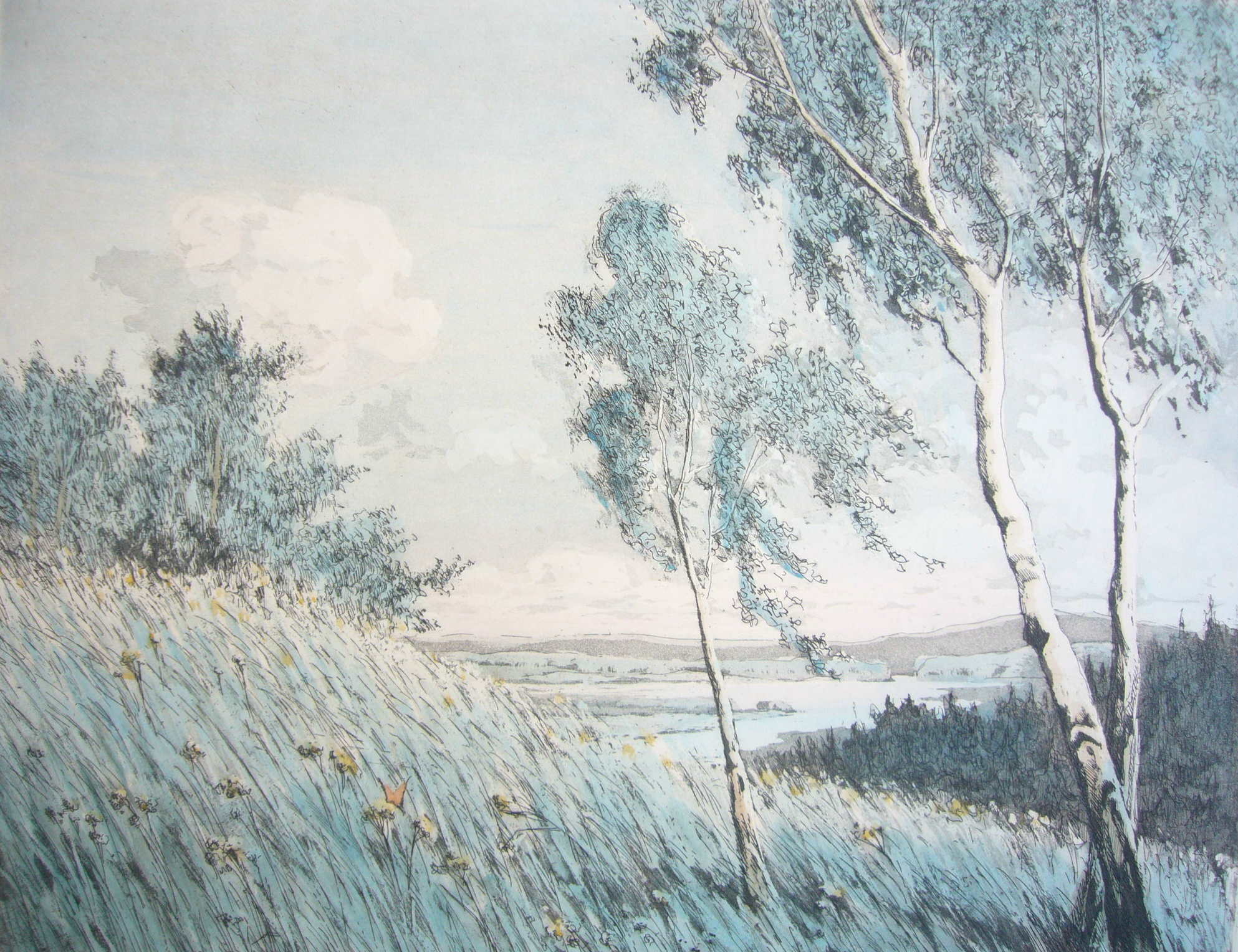 Cornelius Rogge: Sommertag an der Hunte bei Dötlingen